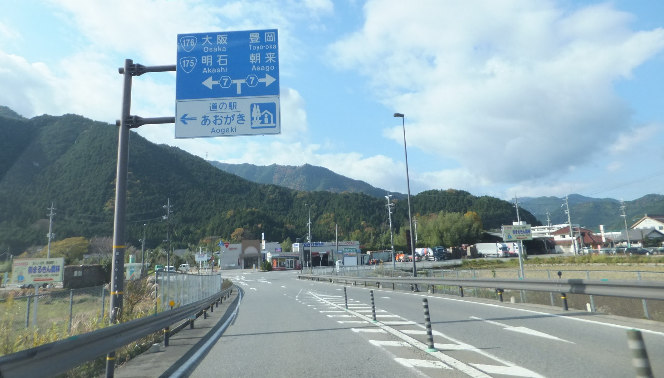 青垣インターチェンジ